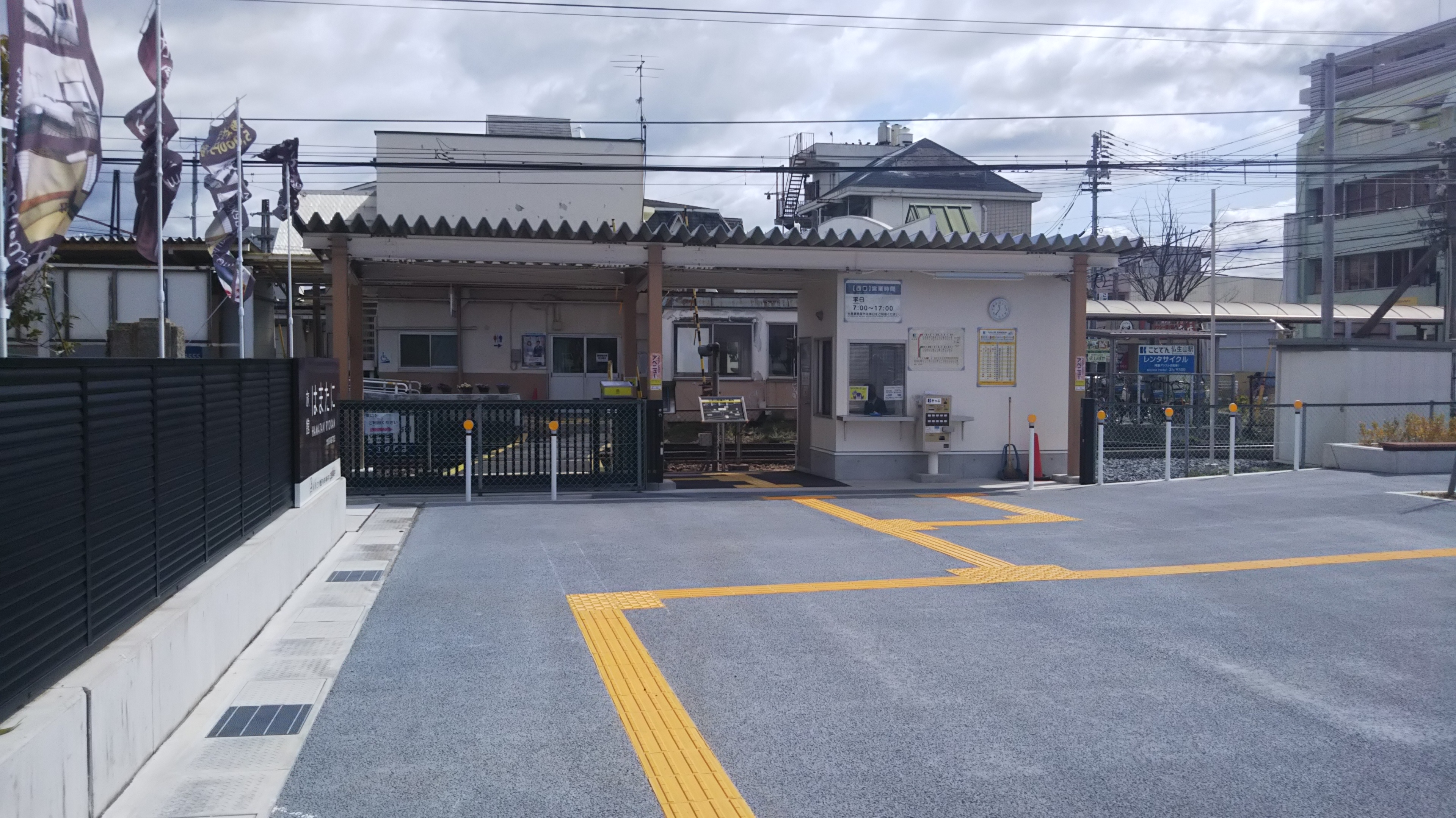 仏生山駅で撮った西改札